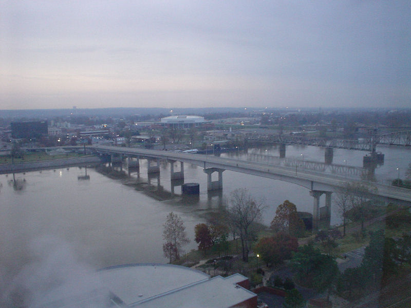 Horizonte urbano de Little Rock, Arkansas desde el río Arkansas.